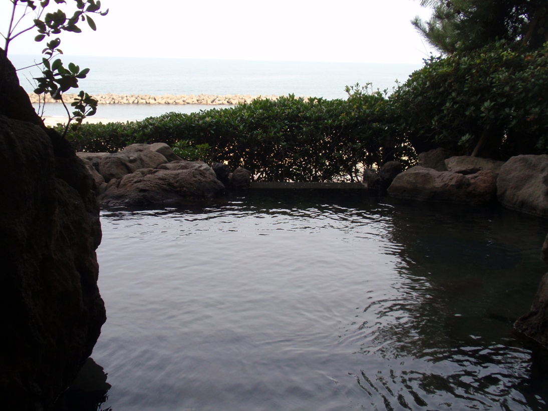 新潟県村上市瀬波温泉大観荘の露天風呂